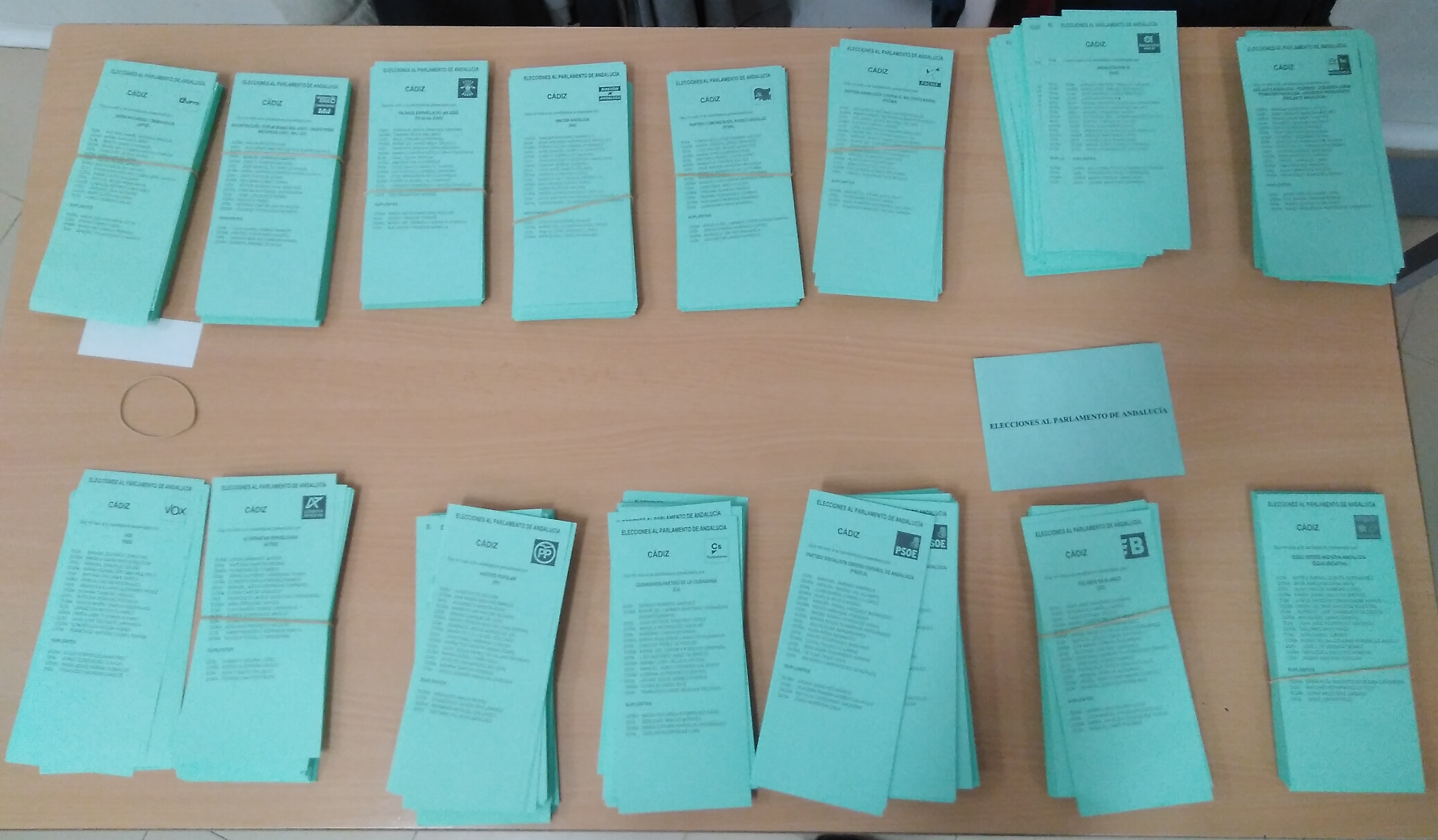 Papeletas elecciones andaluzas 2D 2018 - Cádiz